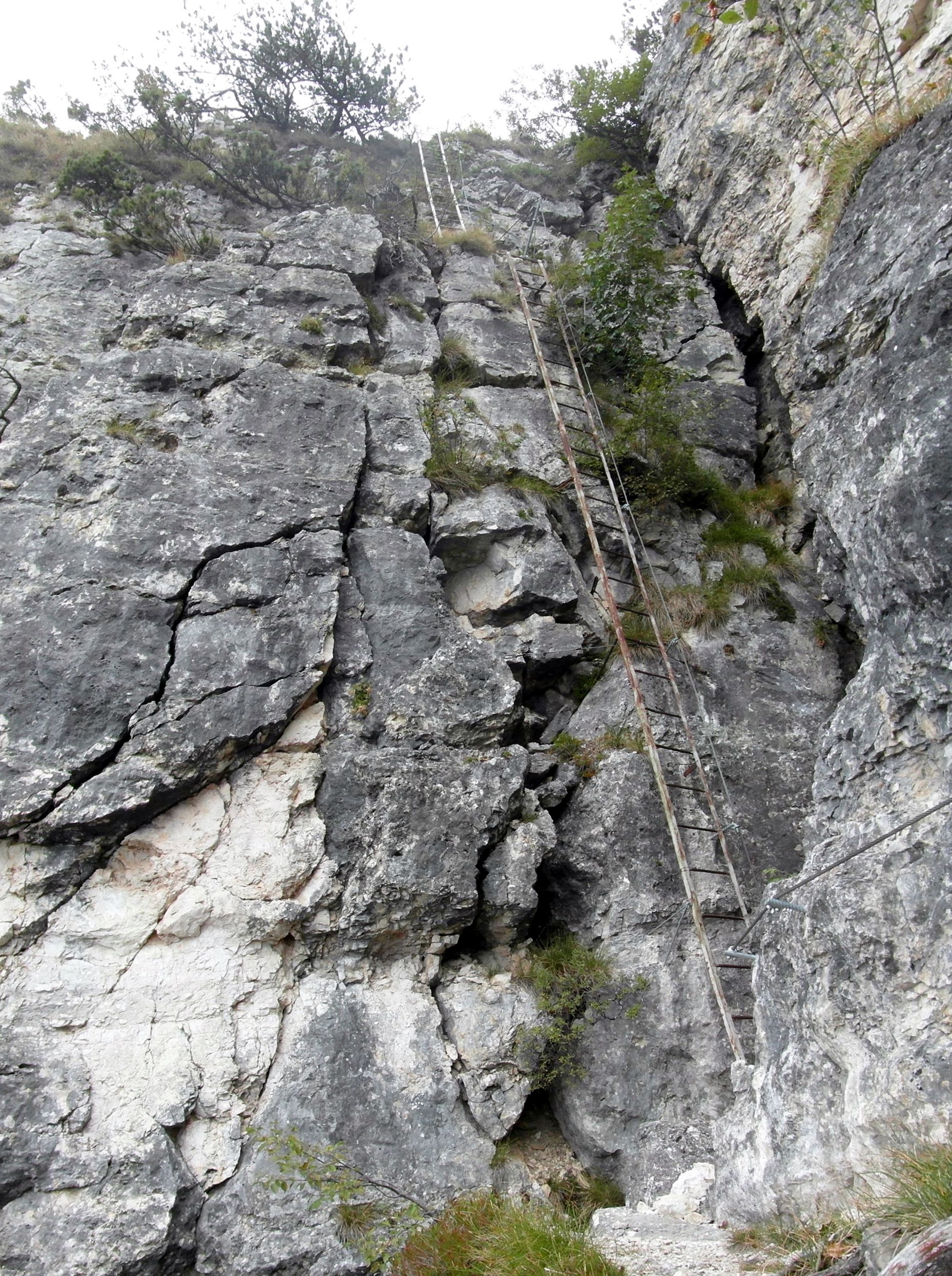 Sentiero attrezzato Bettotti